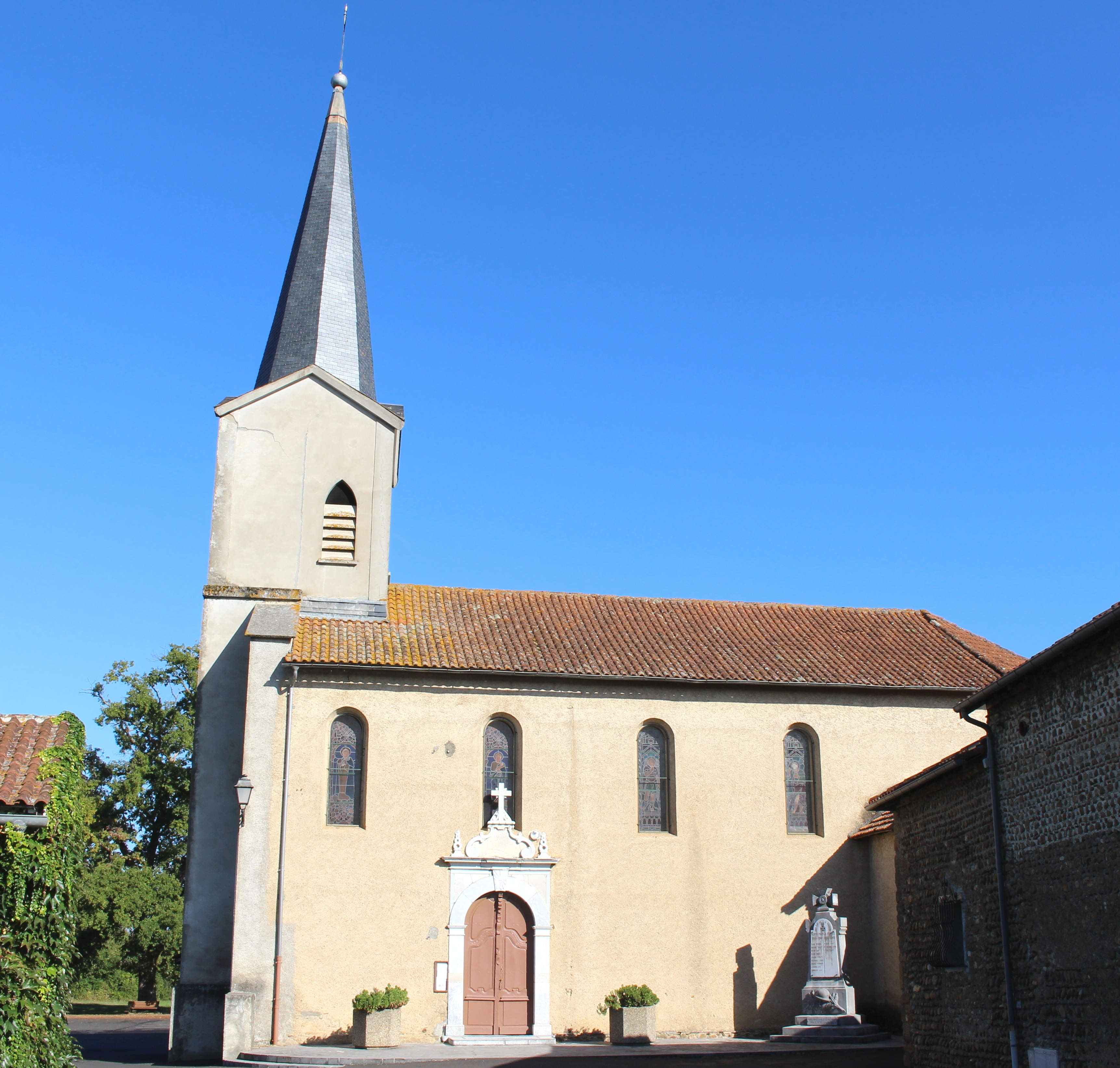 Église Saint-Martin de Goudon (Hautes-Pyrénées)